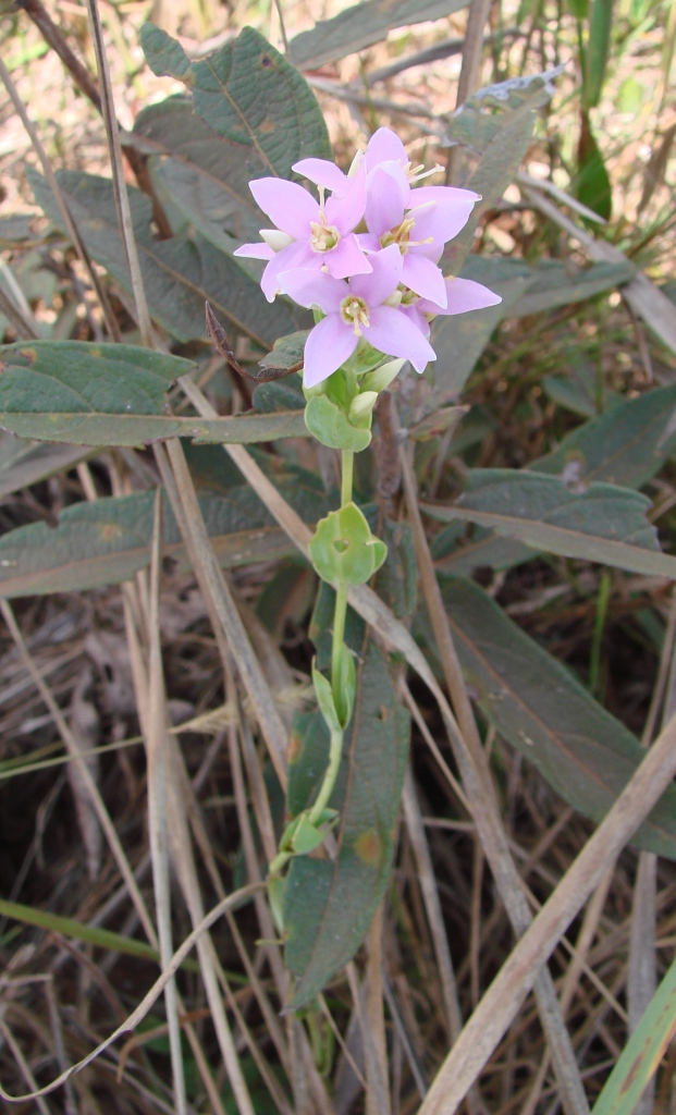 Deianira nervosa